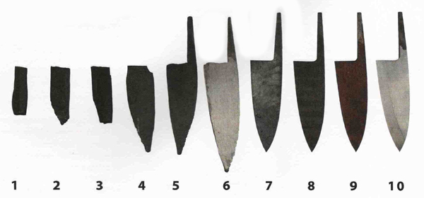 Один из способов формирования японского клинка Деба на фабрике Fujitora Industry (торговая марка Tojiro).